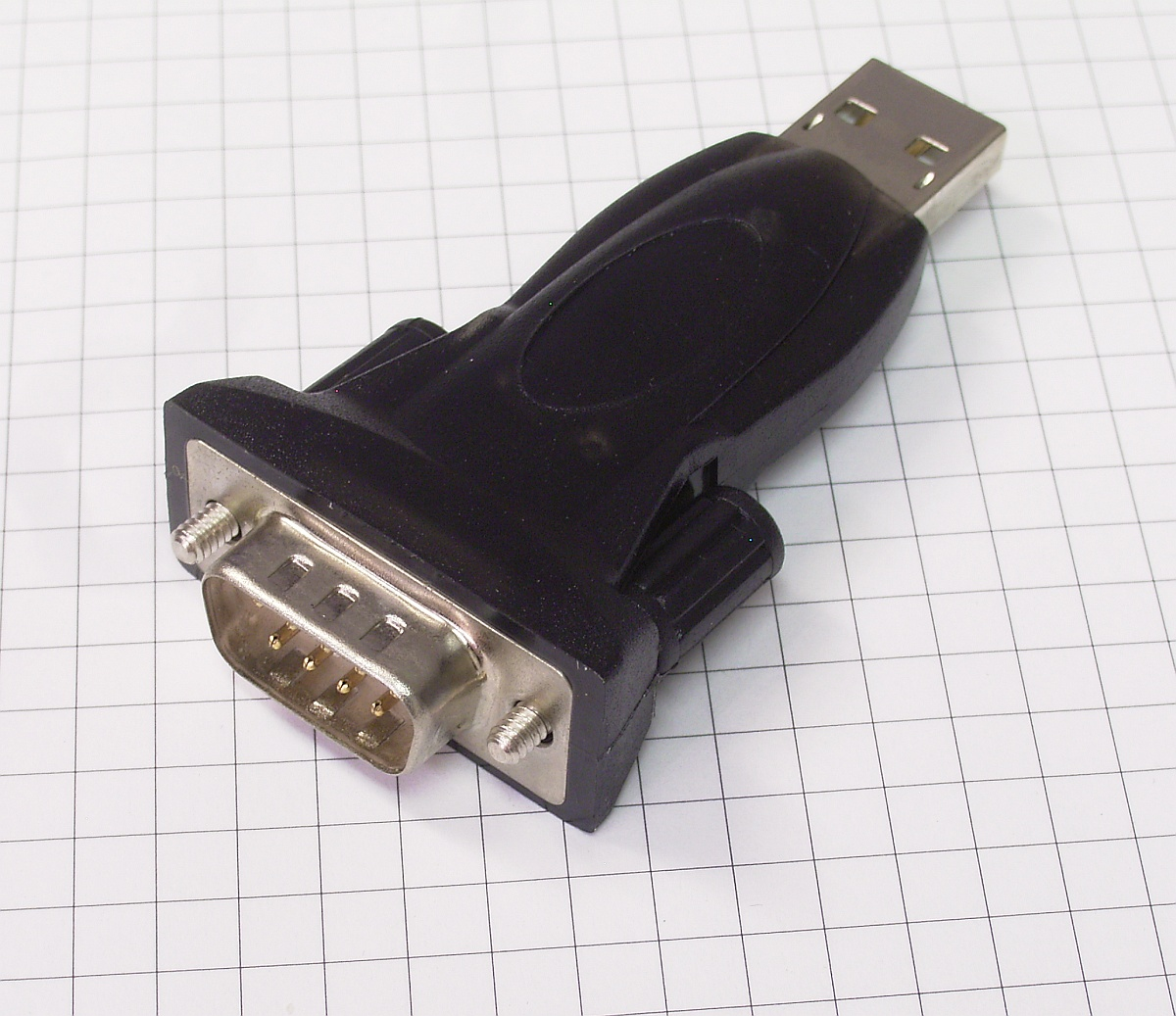 Konverter RS232 USB